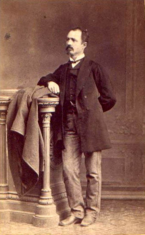 Fotografie - Nicolae Grigorescu - din perioada 1870 - 1873